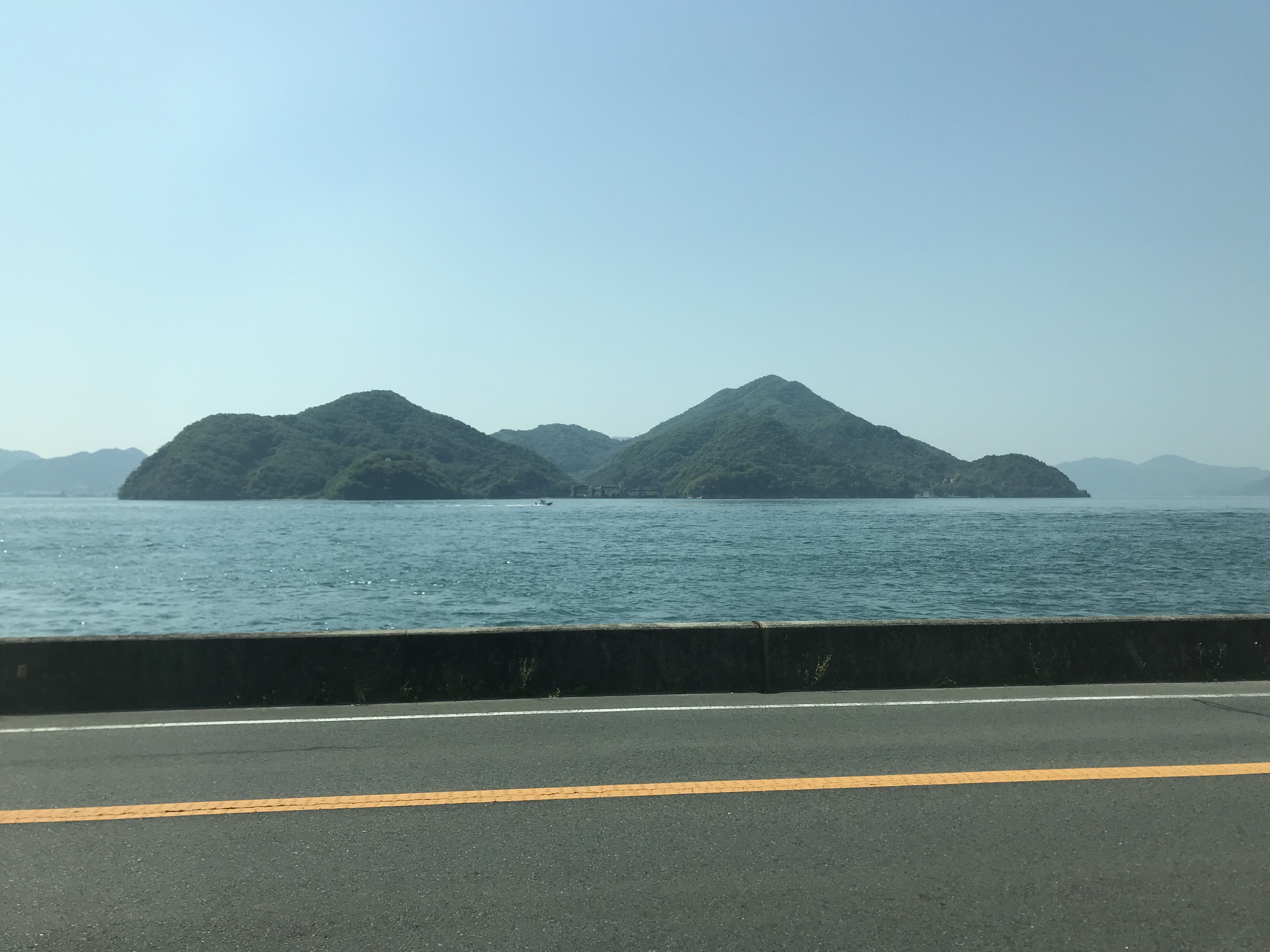 呉線列車内より望む高根島。左奥は生口島、右奥は大三島